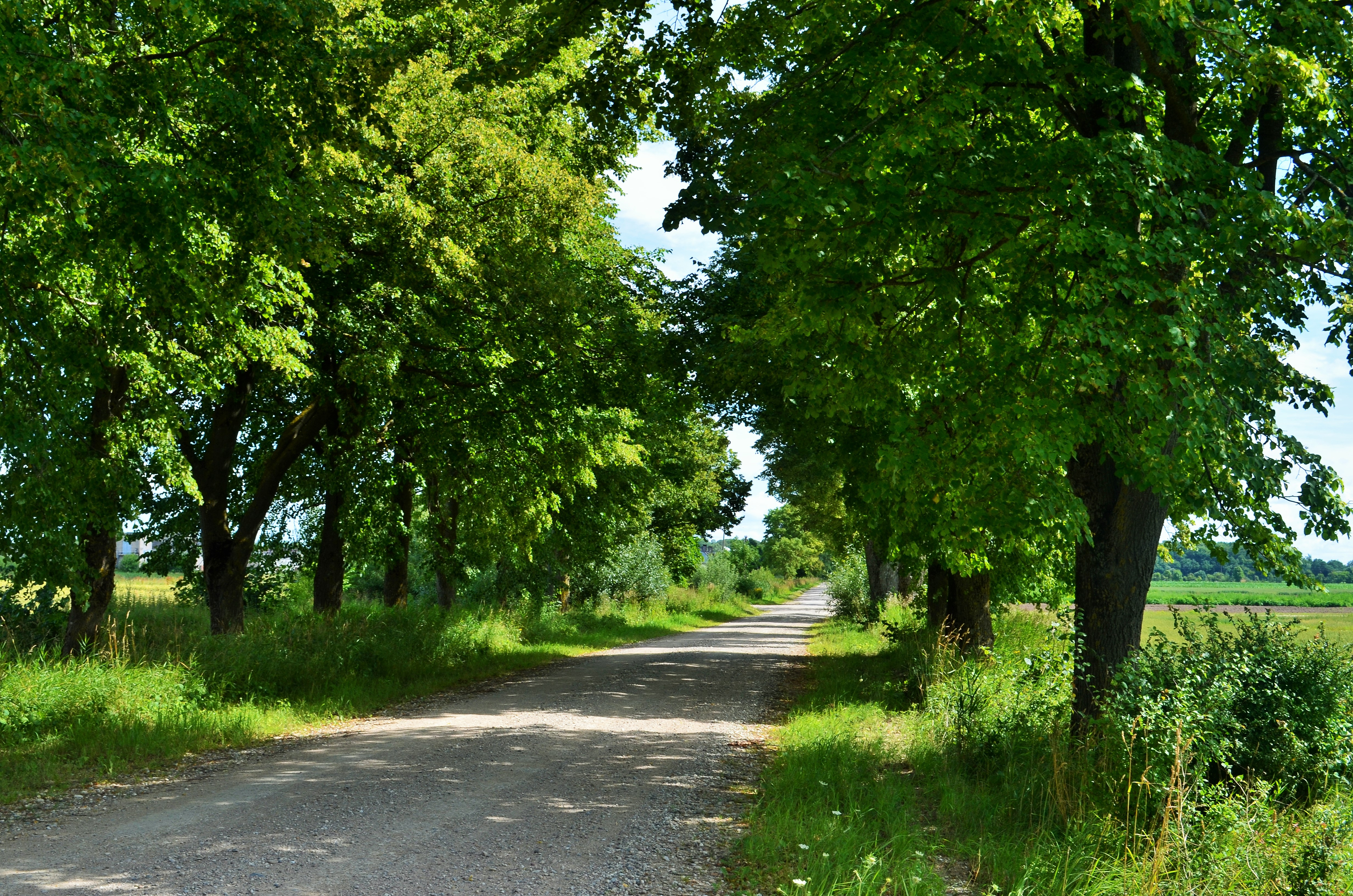 Liepų alėja į Žemaičius, Kėdainių raj.